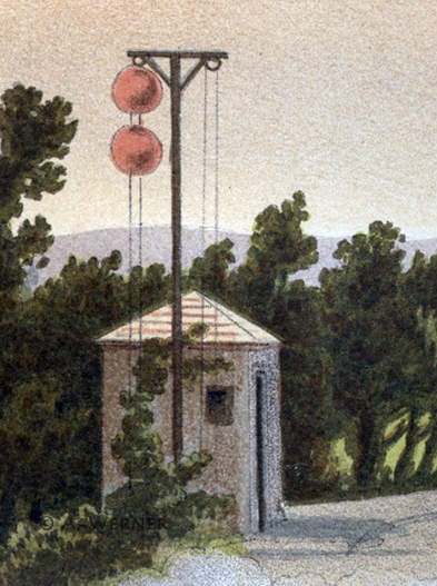 Korbsignal und Streckenposten. Ausschnitt aus einer Lithographie von J. Breyer aus der Serie «Heldenzüge 1859», gedruckt in der k. k. Hof- und Staatsdruckerei in Wien, 1864.